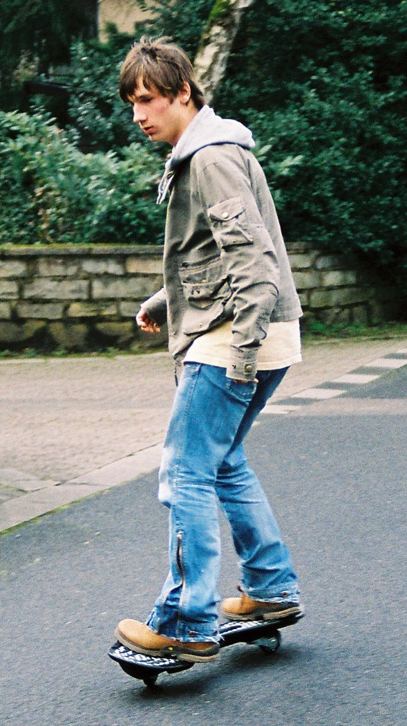 Waveboard in Fahrt